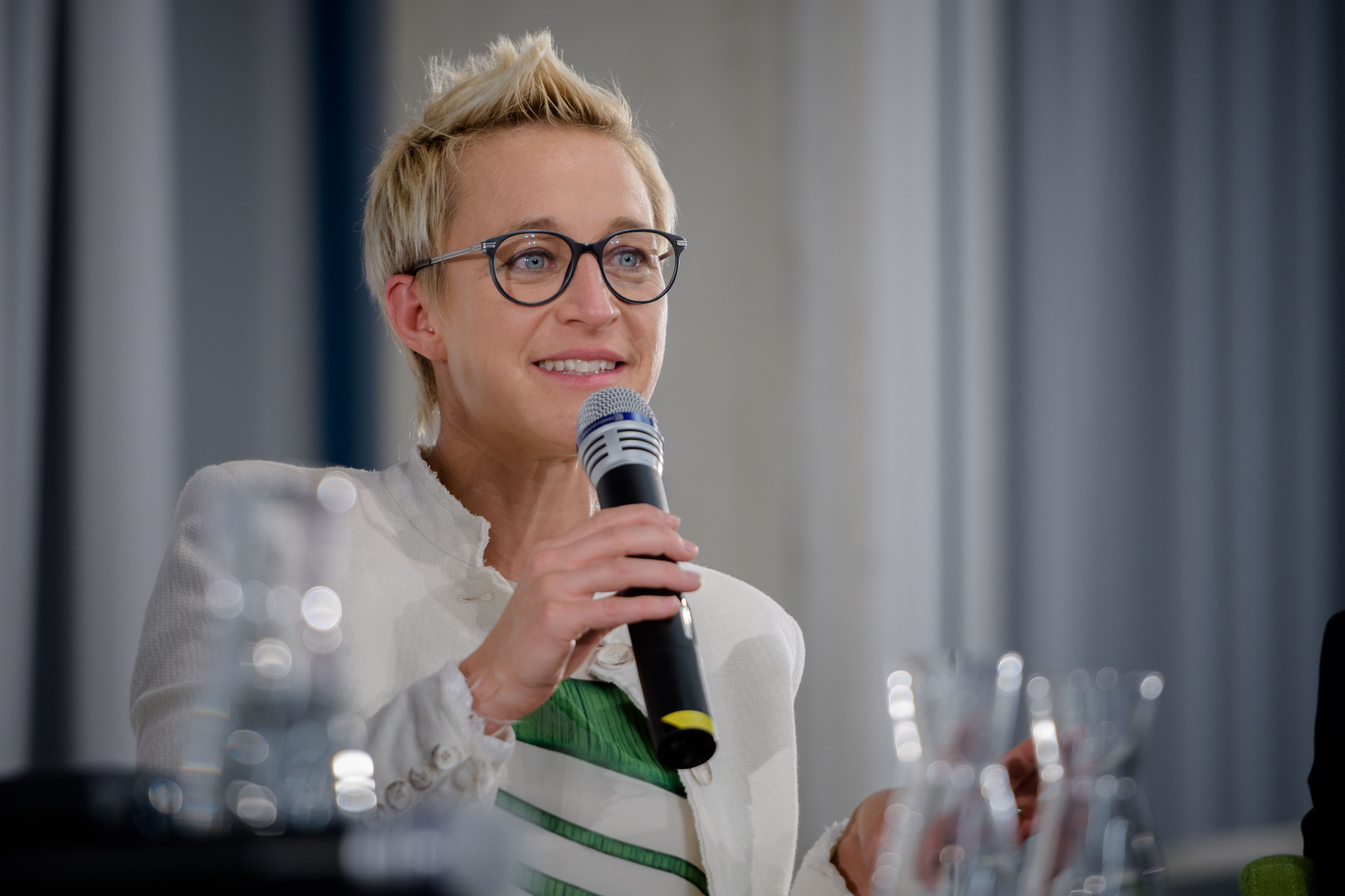 Nadine Schön (MdB, Stellv. Fraktionsvors. CDU/CSU-Fraktion) bei einer Podiumsdiskussion in der Heinrich-Böll-Stiftung